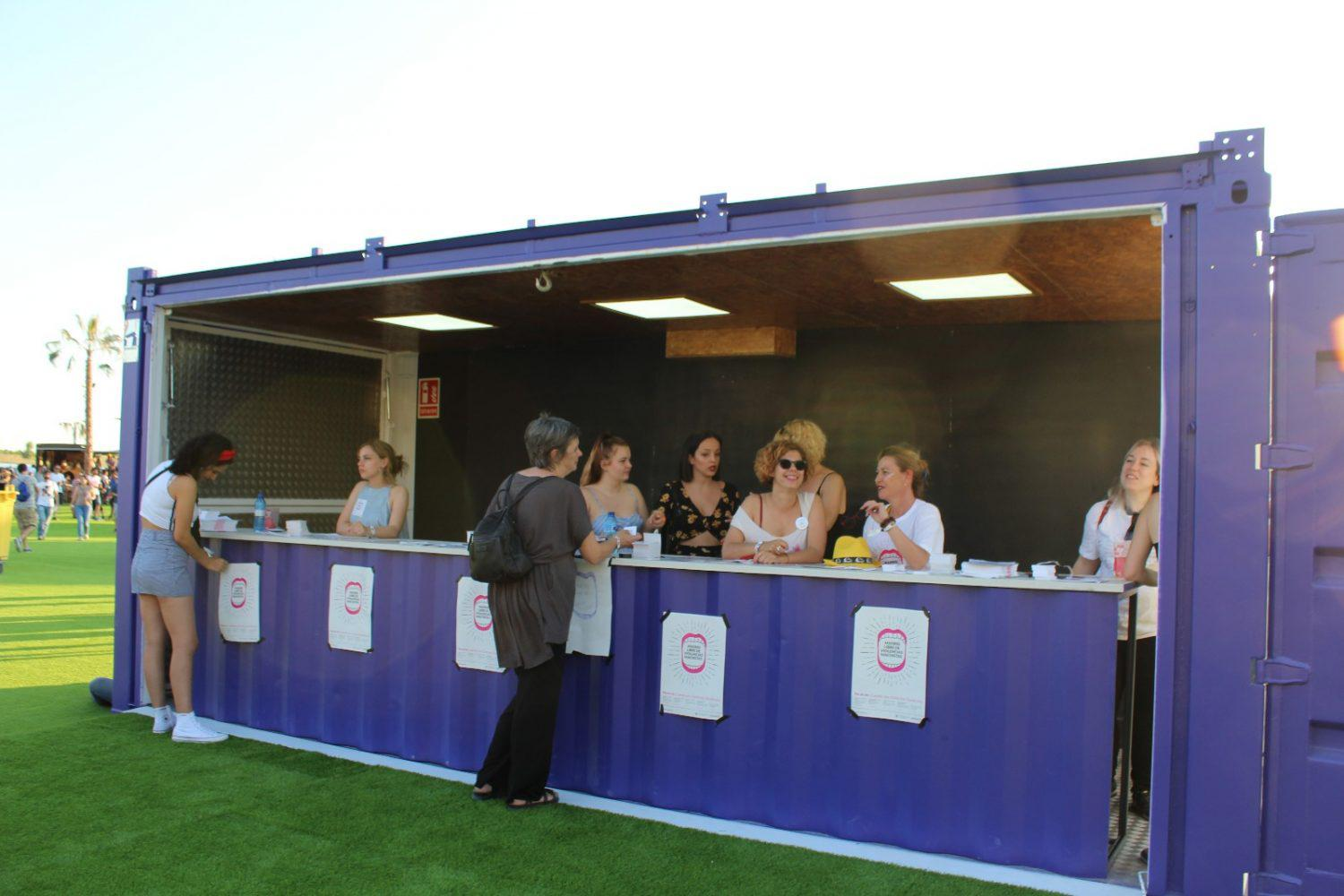 El punto violeta instalado por el Área de Género y Diversidad en el Festival Mad Cool ha servido para sensibilizar a las miles de personas asistentes al evento musical de que la violencia sexual no tiene cabida en los espacios de ocio, que todos y todas podemos hacer algo para acabar con ella, que son los agresores los que deben sentir vergüenza, que las mujeres tienen derecho a divertirse sin sentir miedo y que no están solas.